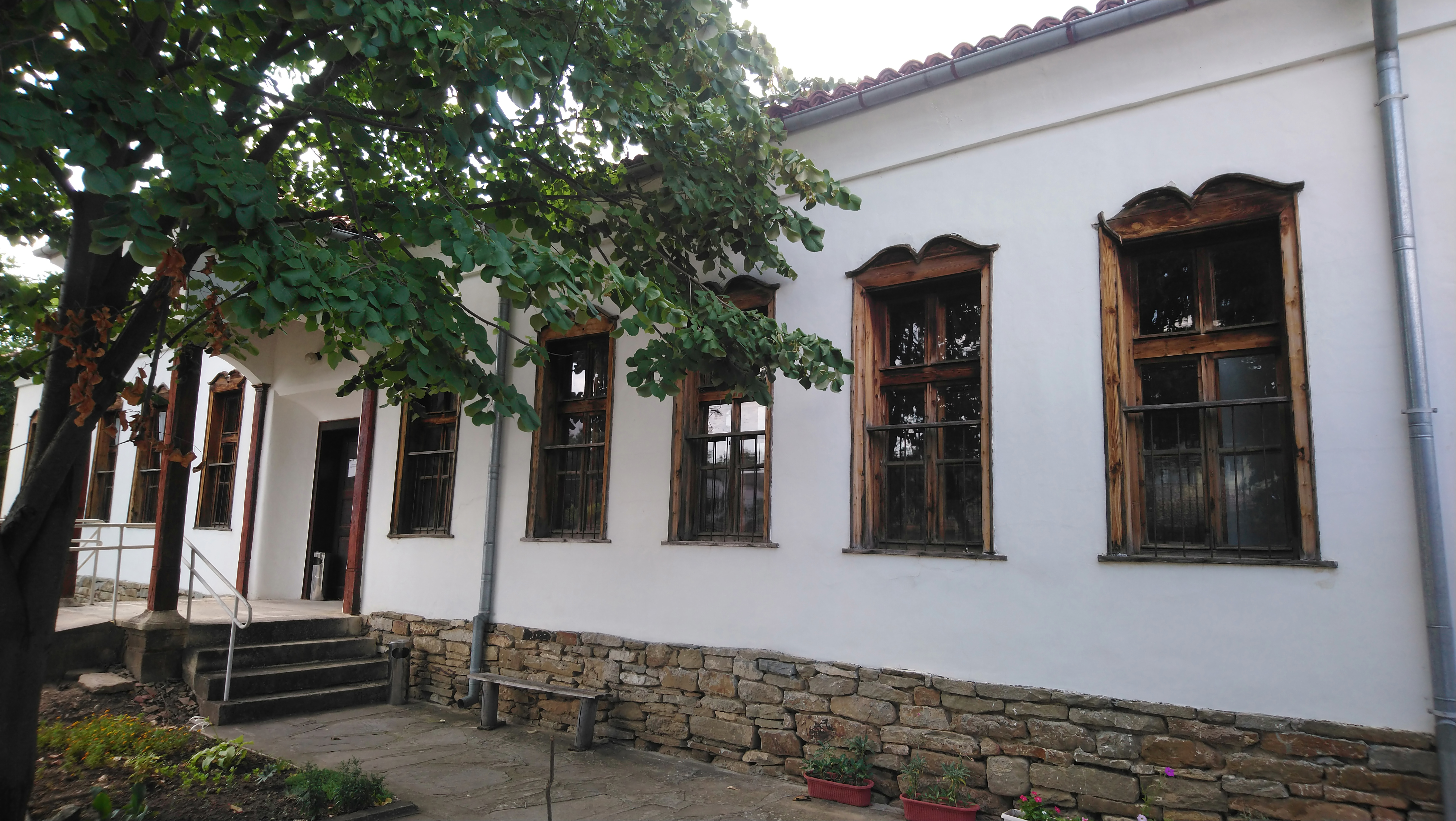 Smyadovo Art Gallery "Stoycho Presnakov"